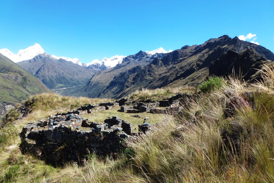 El sitio arqueológico de Wacramarca ubicado a 4150 msnm en la provincia de Asunción.